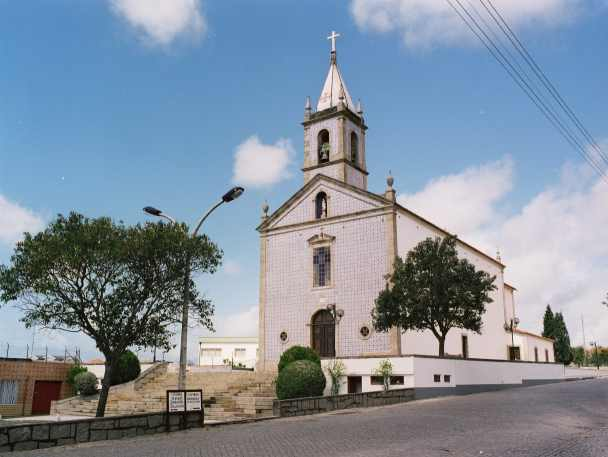 Igreja de São Paio de Oleiros